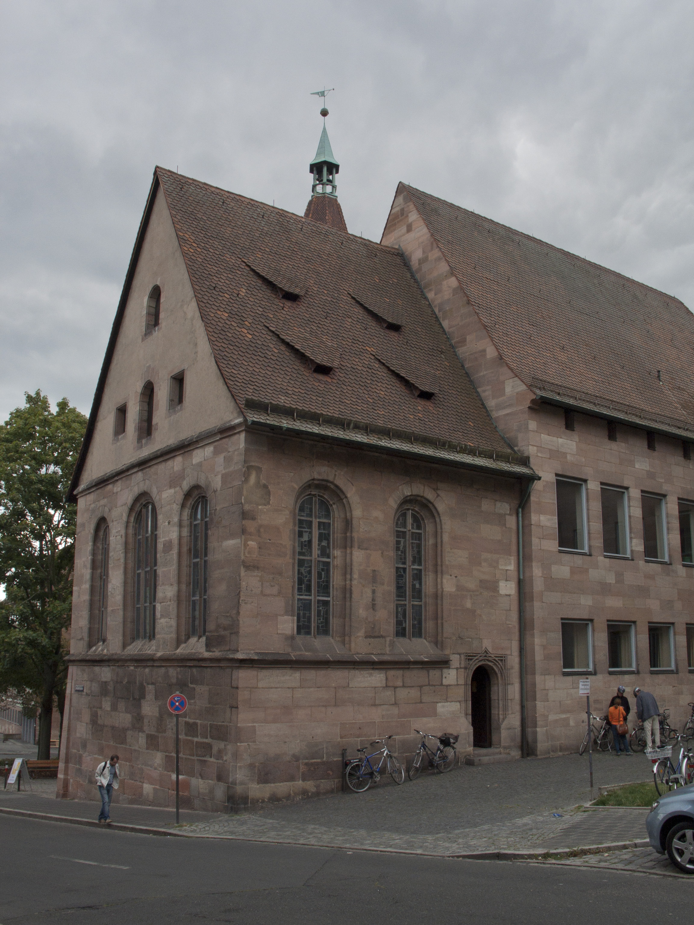 Nürnberg-St. Sebald, Allerheiligenkapelle (auch Landauerkapelle, Innerer Laufer Platz 11).